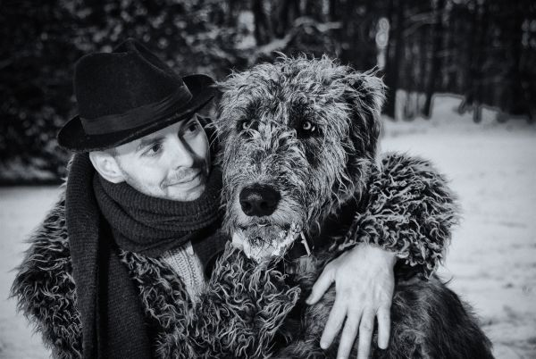 Juhász Tibor festőművész portré